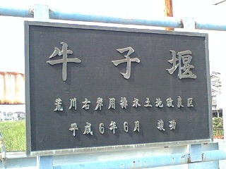 牛子堰（共栄橋）銘板(埼玉県川越市牛子）